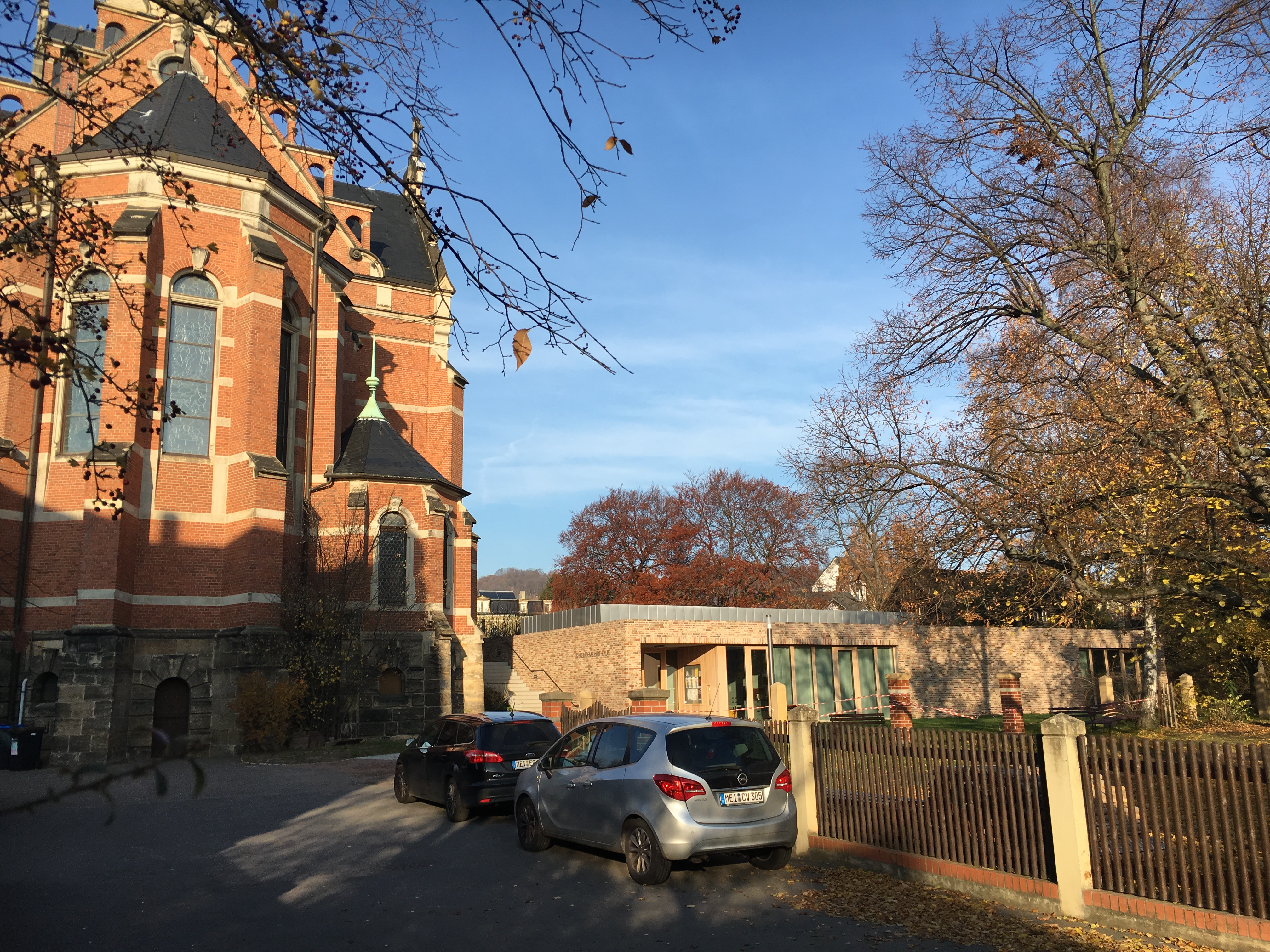 Radebeul Neues Gemeindehaus der Lutherkirche